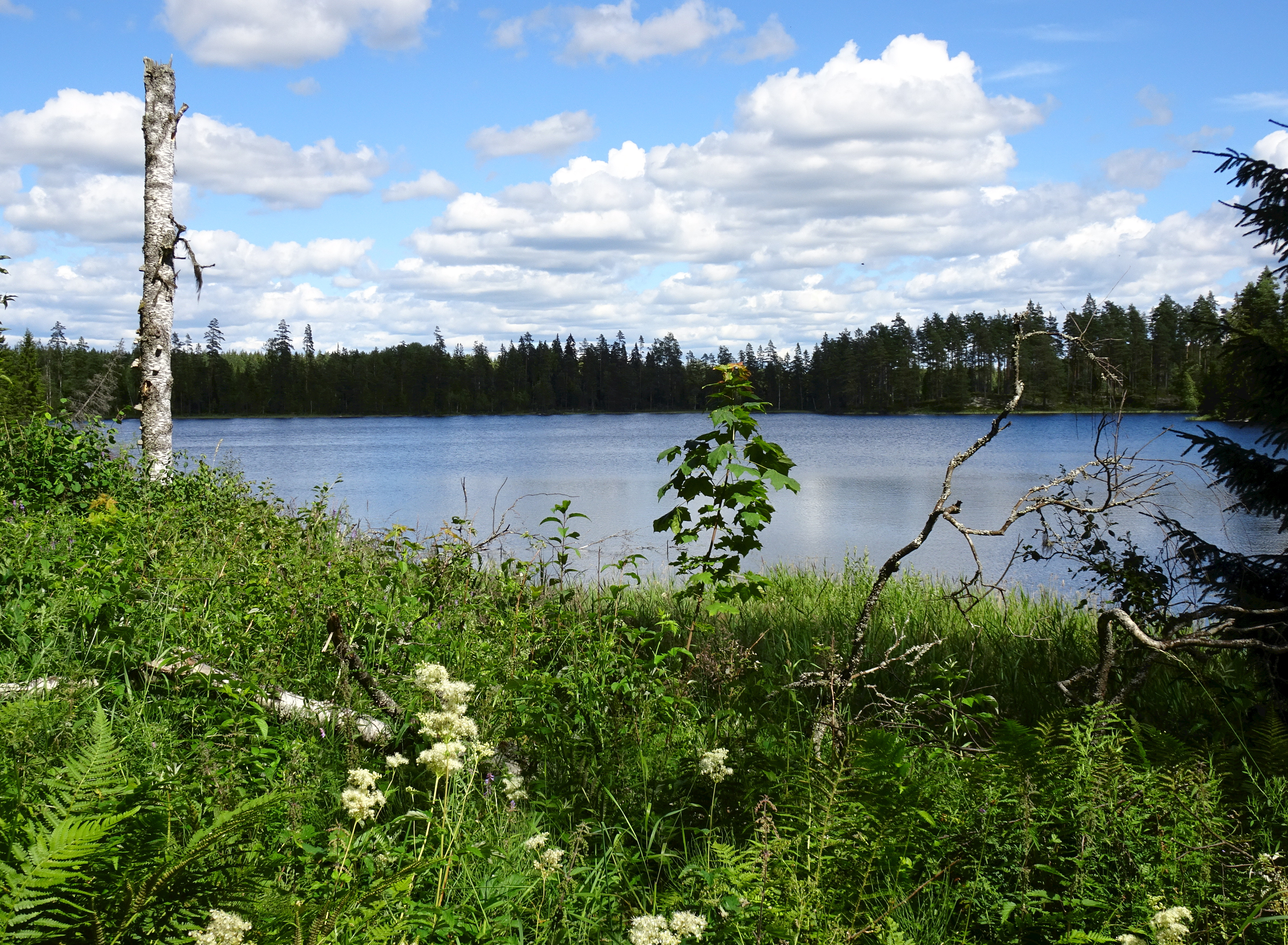 Sävsjön